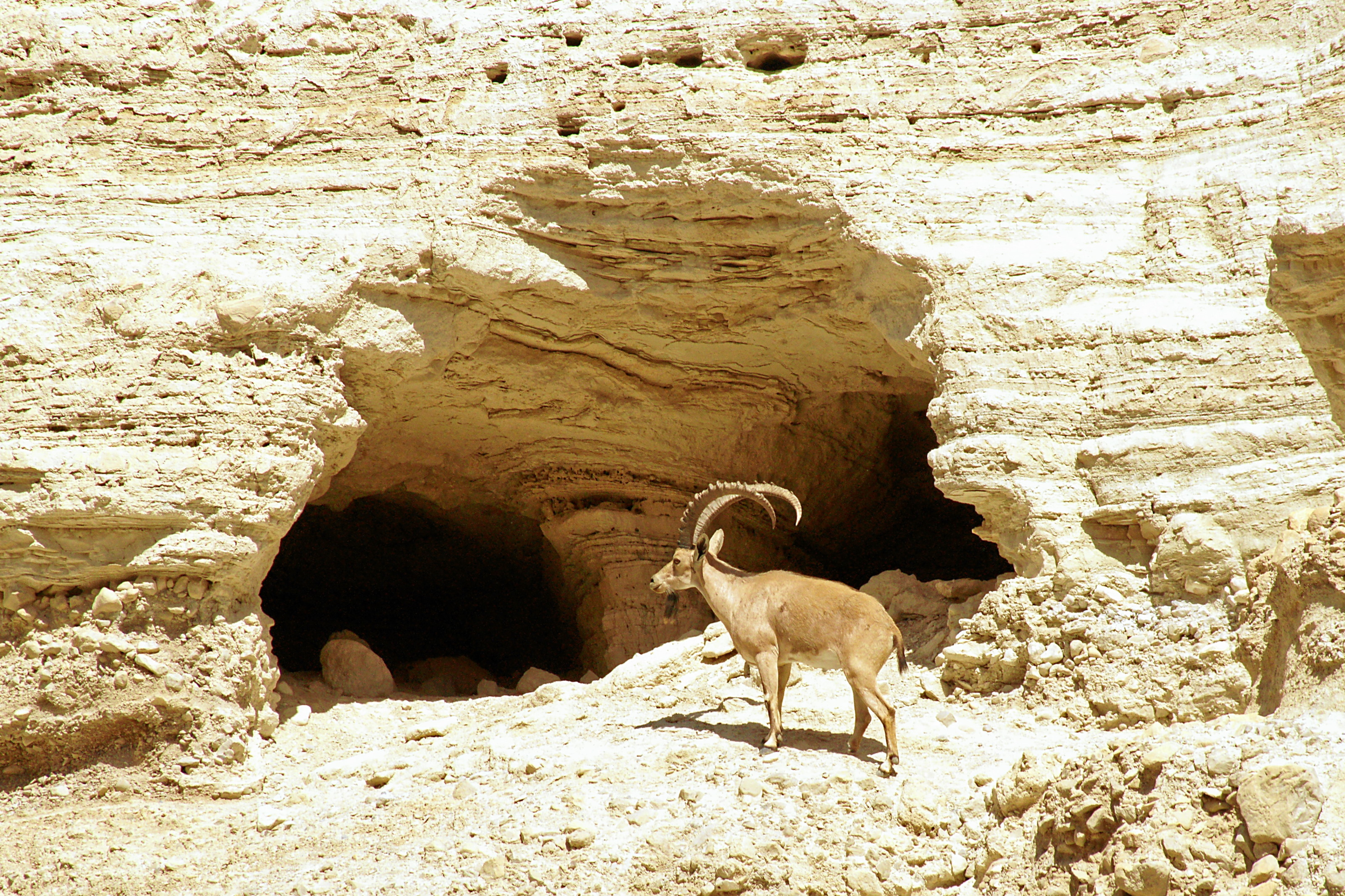 Nahal David: nubischer Steinbock